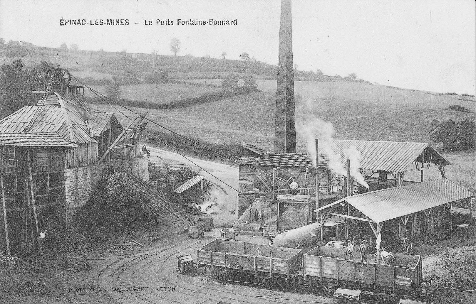 Le puits Fontaine-Bonnard (Houillères d’Épinac, France).